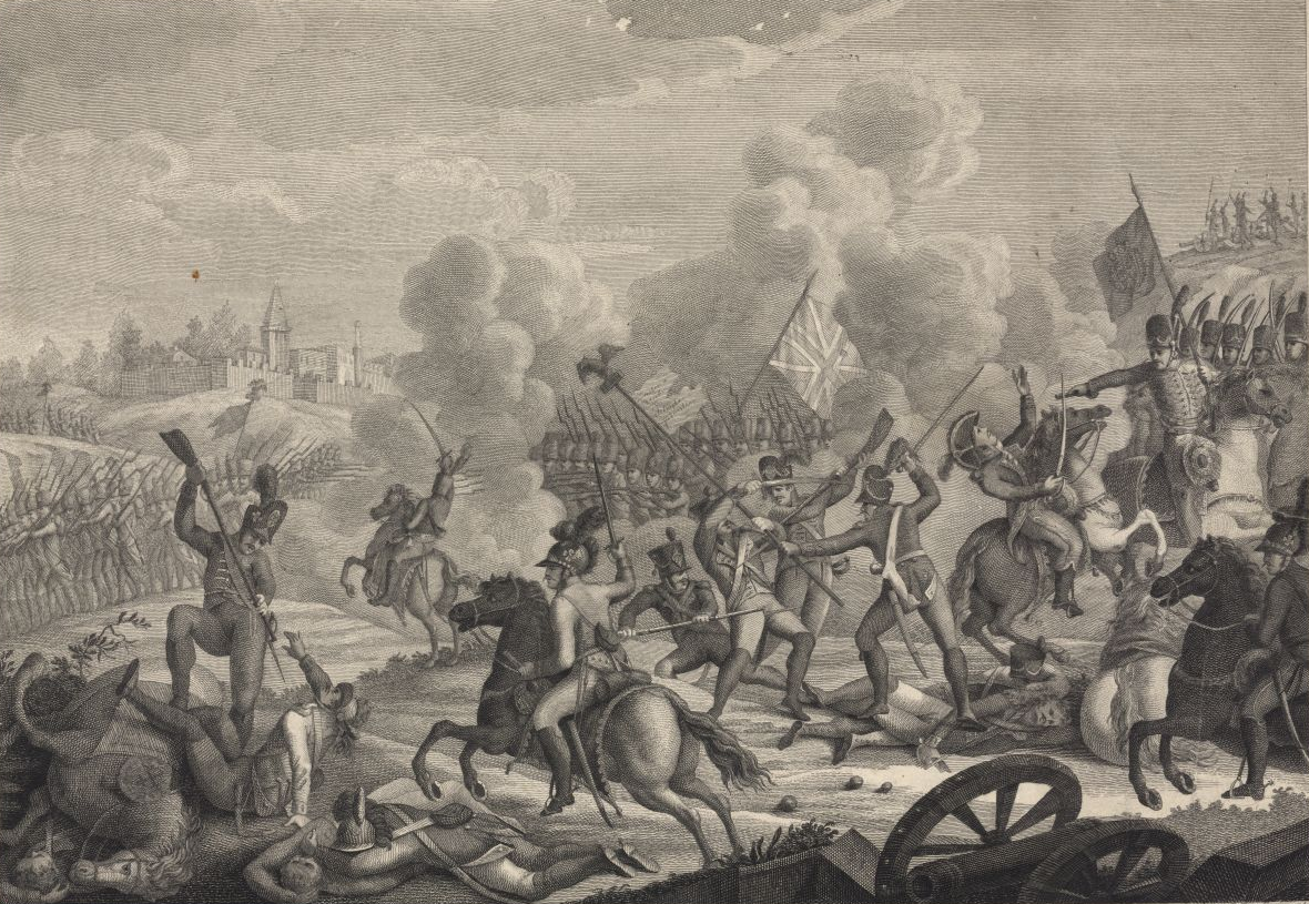 gravure de la Bataille du Vimeiro, Lourinhã.